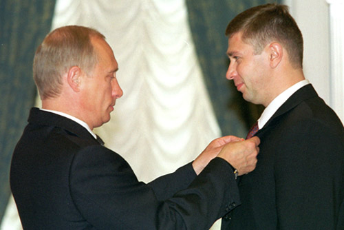 МОСКВА, КРЕМЛЬ. Церемония вручения государственных наград. Звание Героя России присвоено летчику-космонавту Константину Козееву.